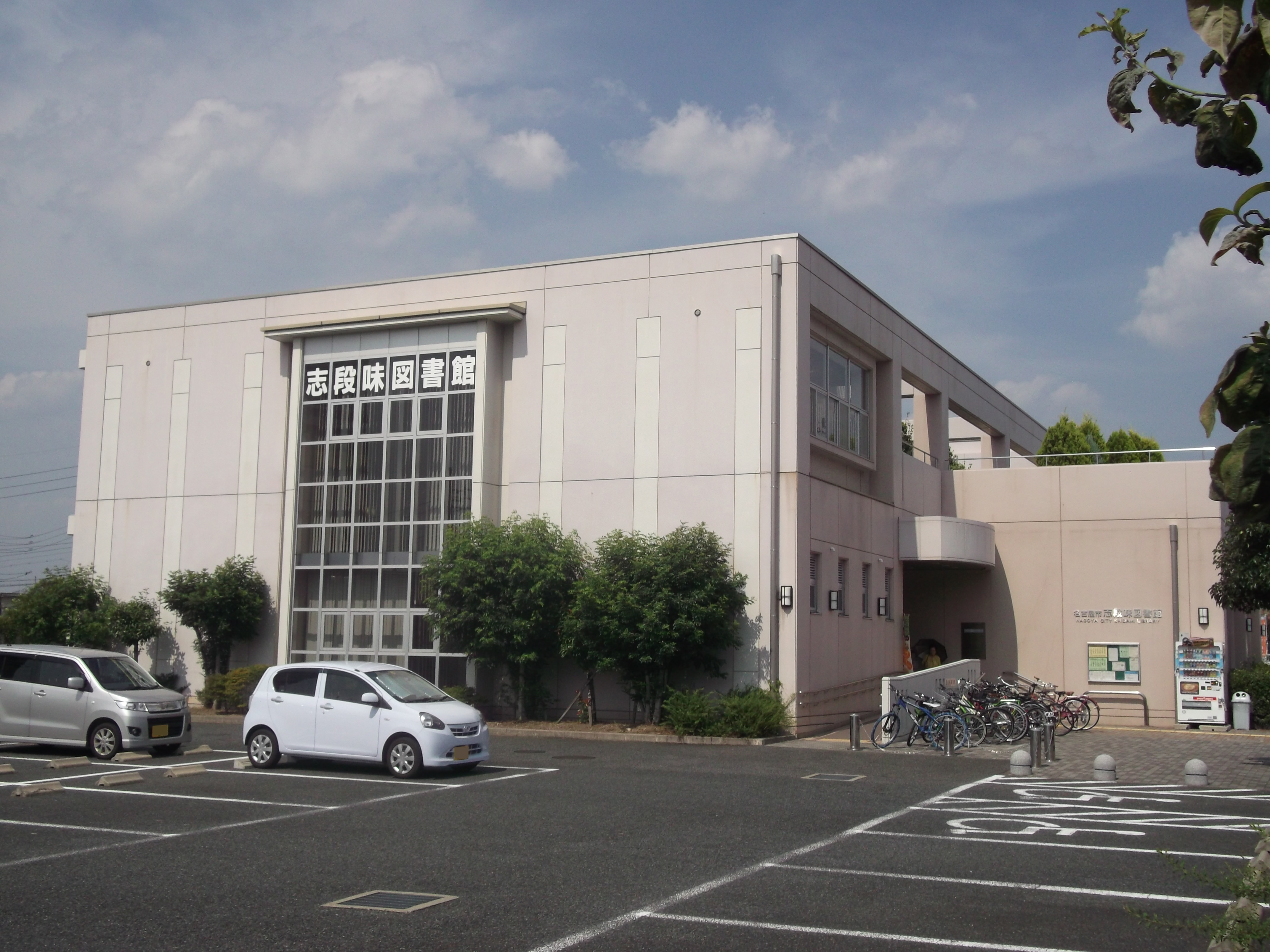 名古屋市守山区深沢1丁目の名古屋市志段味図書館を西側公道から撮影